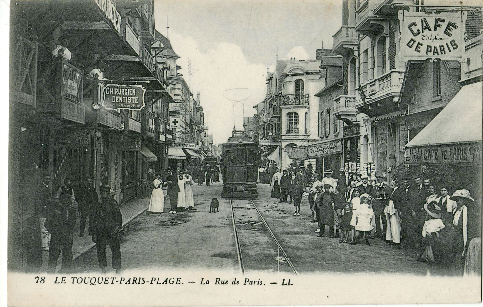 Carte postale ancienne éditée par LL, n°78 : Le Touquet-Paris-Plage - La Rue de Paris